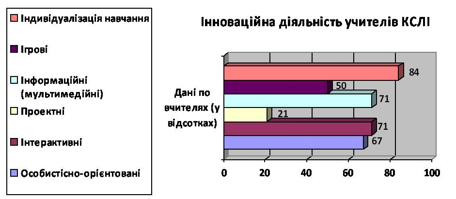 Інноваційна діяльність